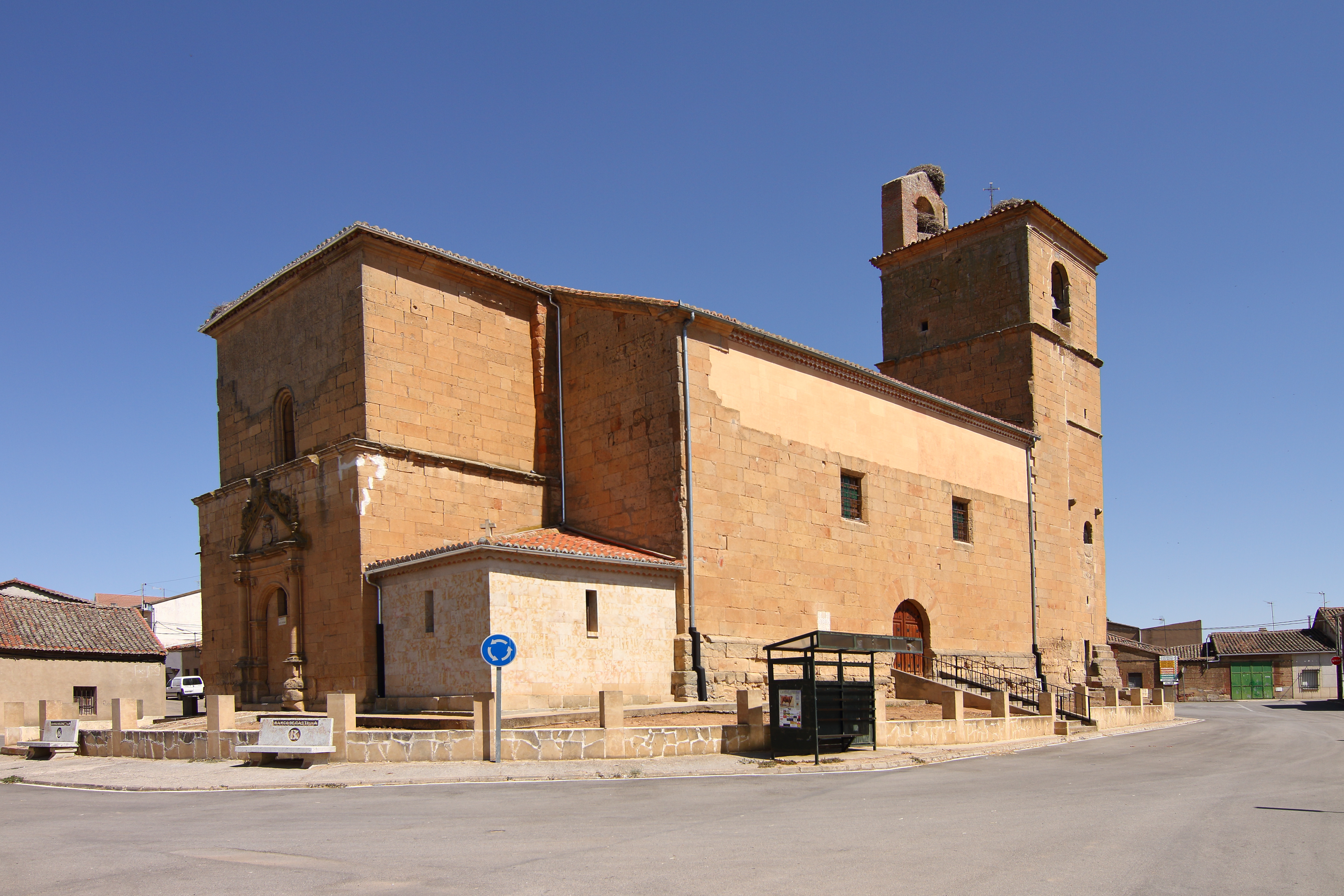 Iglesia de San Pedro Apóstol, fachada principal